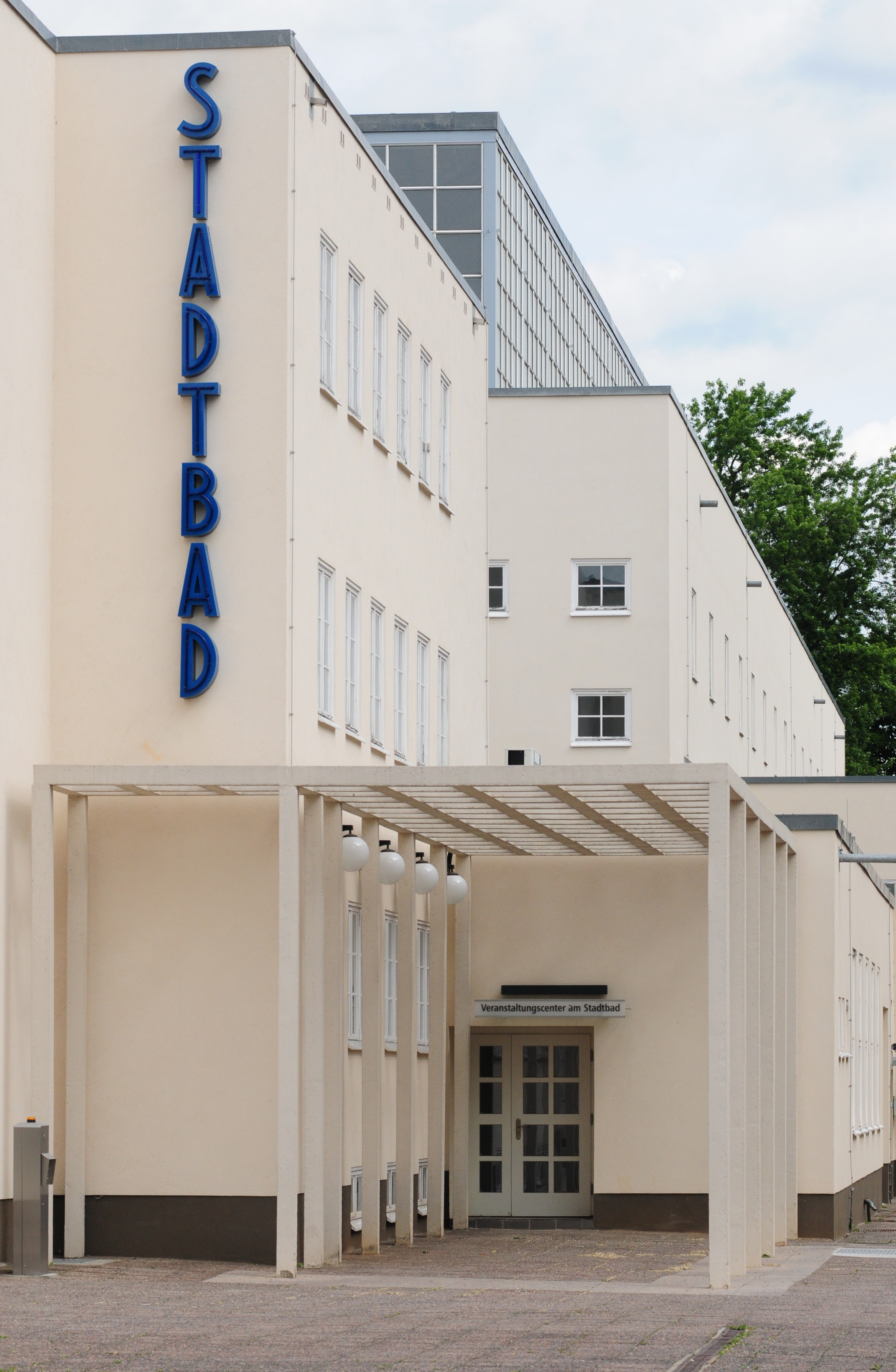 Stadtbad in Chemnitz, errichtet 1928-1935 nach Entwurf von Stadtbaurat Fred Otto (Sachsen, Deutschland)